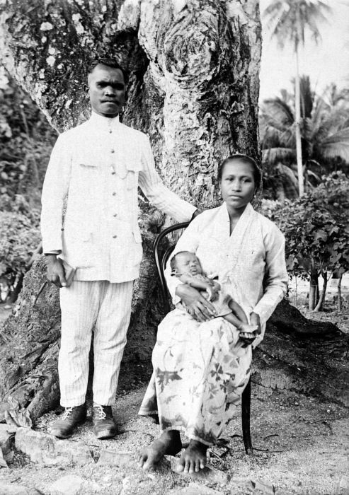 Repronegatief. Een Christelijk Moluks echtpaar met een baby op Jamdena, Tanimbar-eilanden